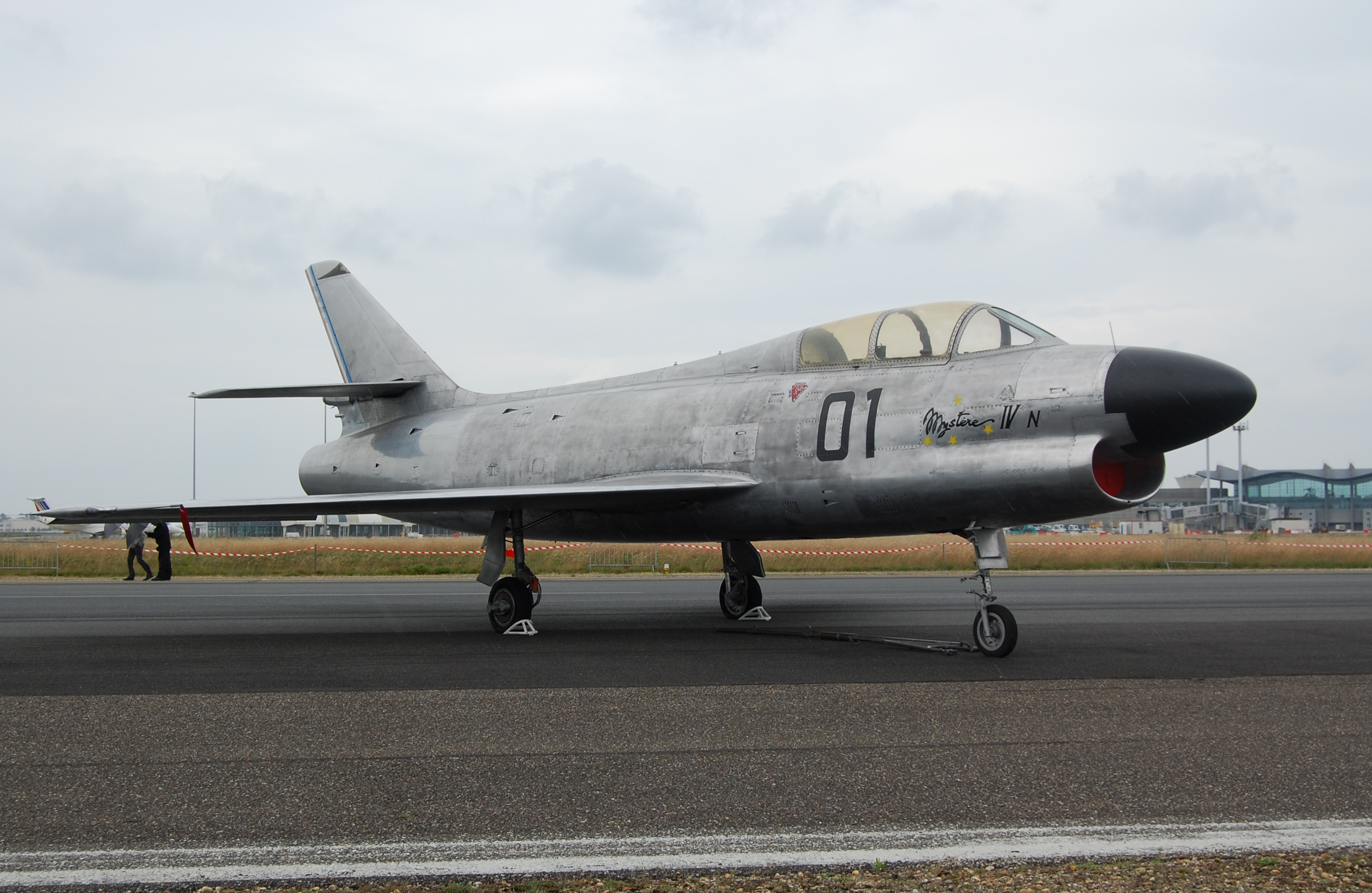 Mystère IV N aux cent ans de l'aviation de Mérignac.